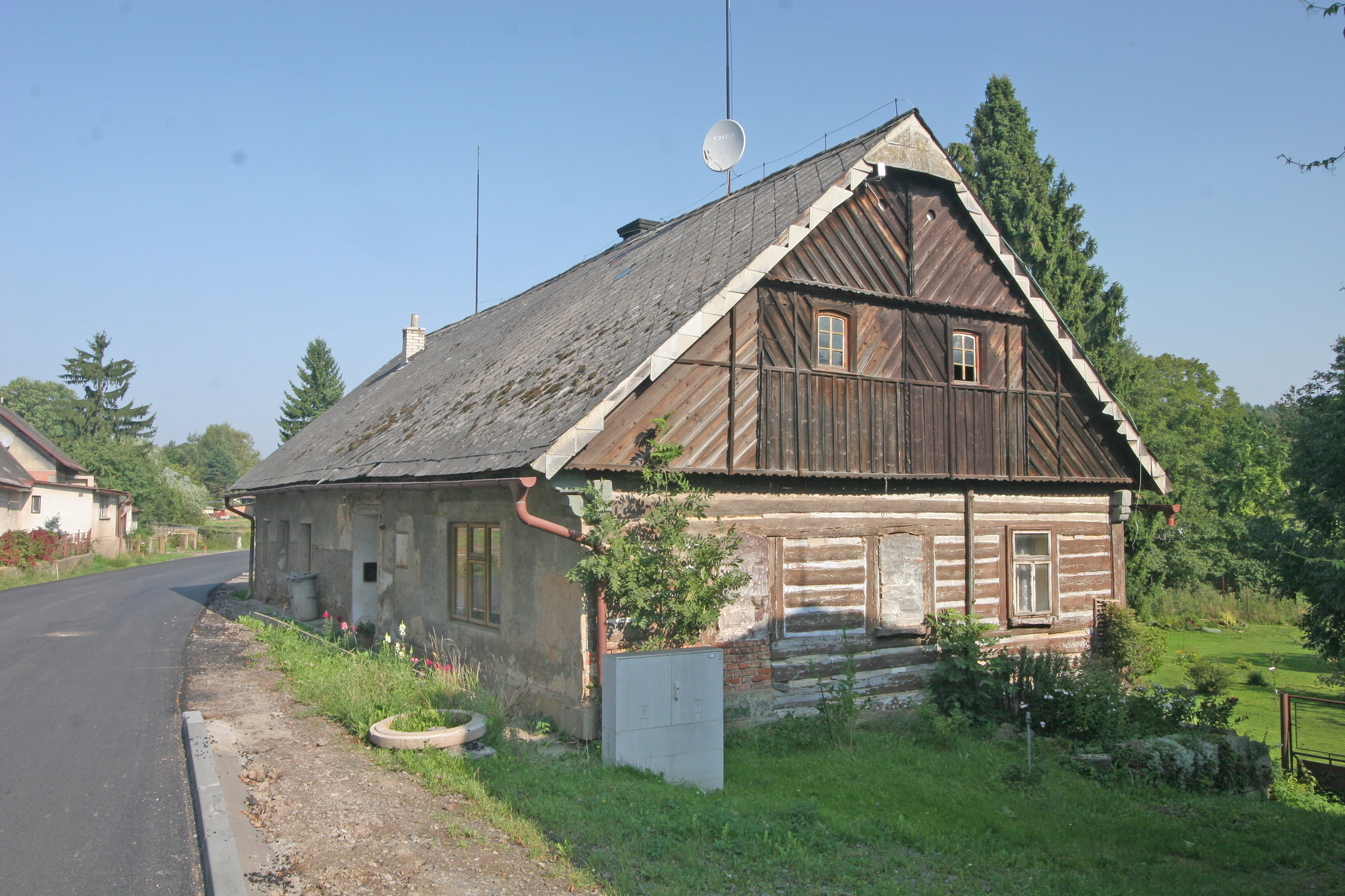 Vítězná čp. 78